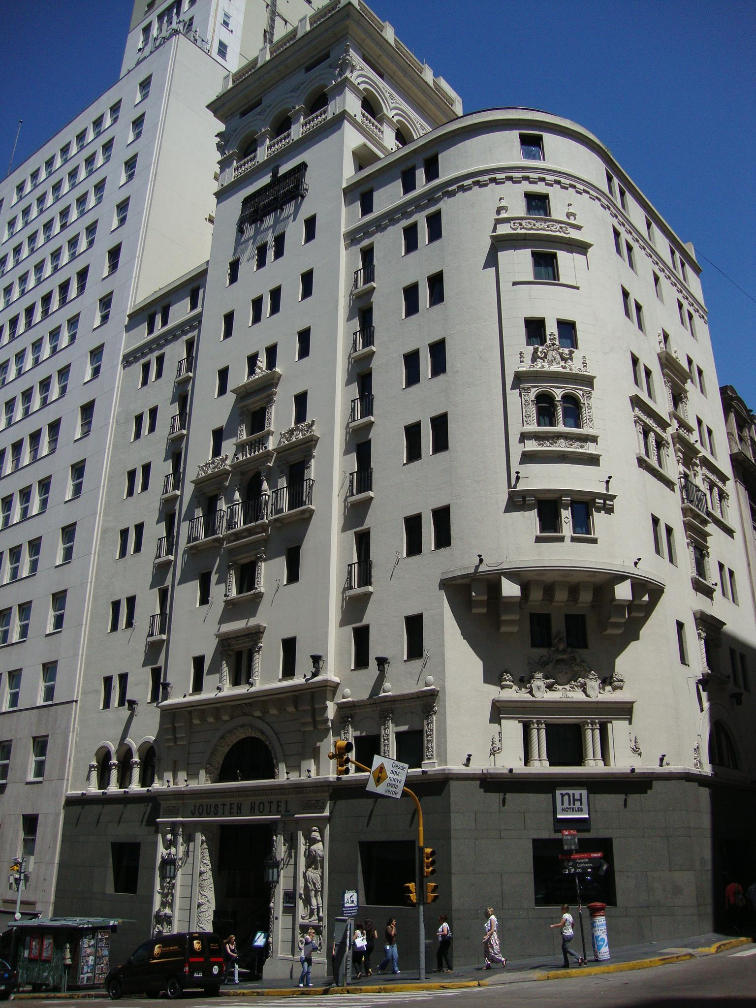 Jousten Hotel, en Avenida Corrientes esquina con 25 de Mayo. Actualmente, parte de la cadena NH Hoteles. Buenos Aires, Argentina.